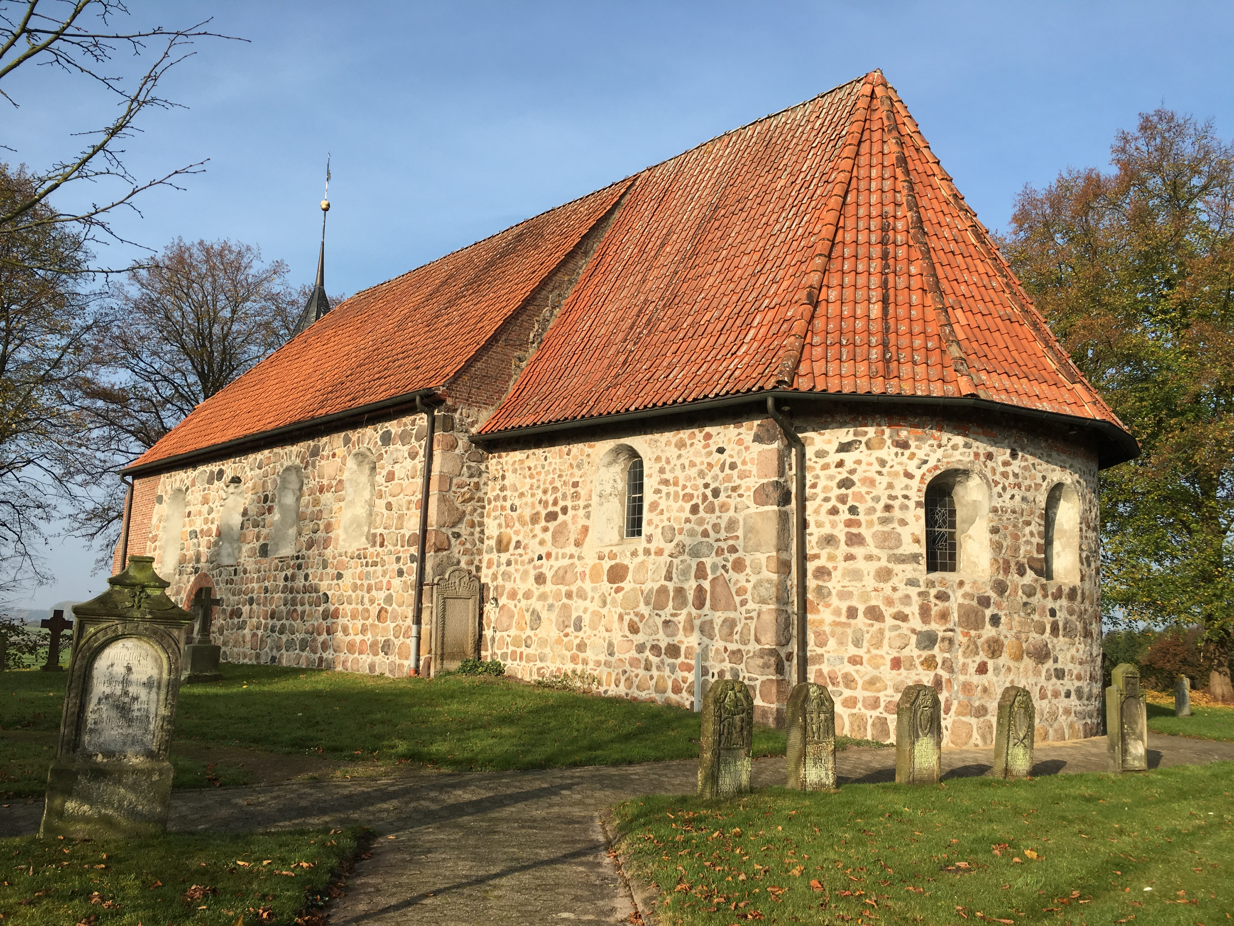 Kark op de Host bi Burweg